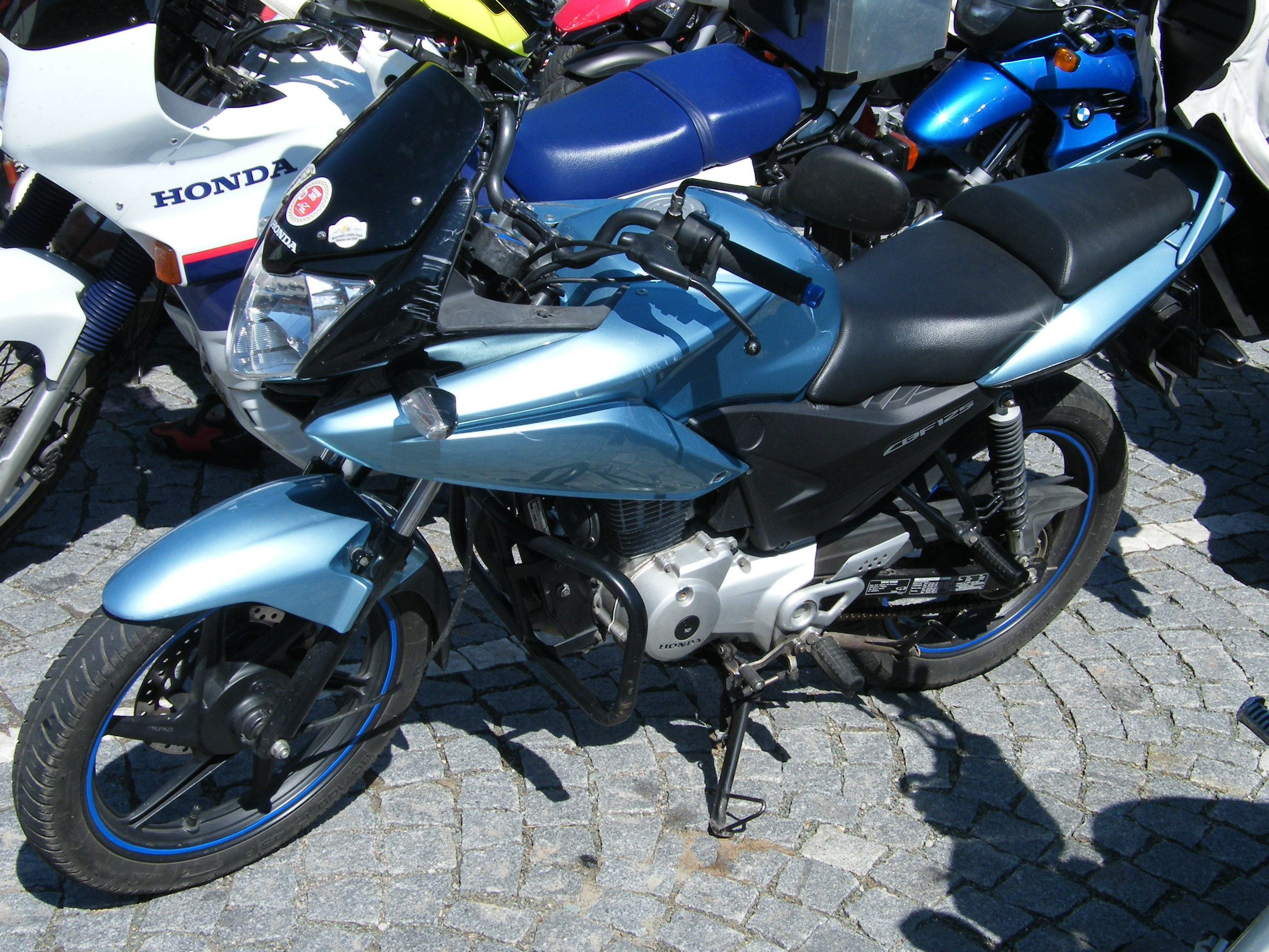 Honda CBF 125